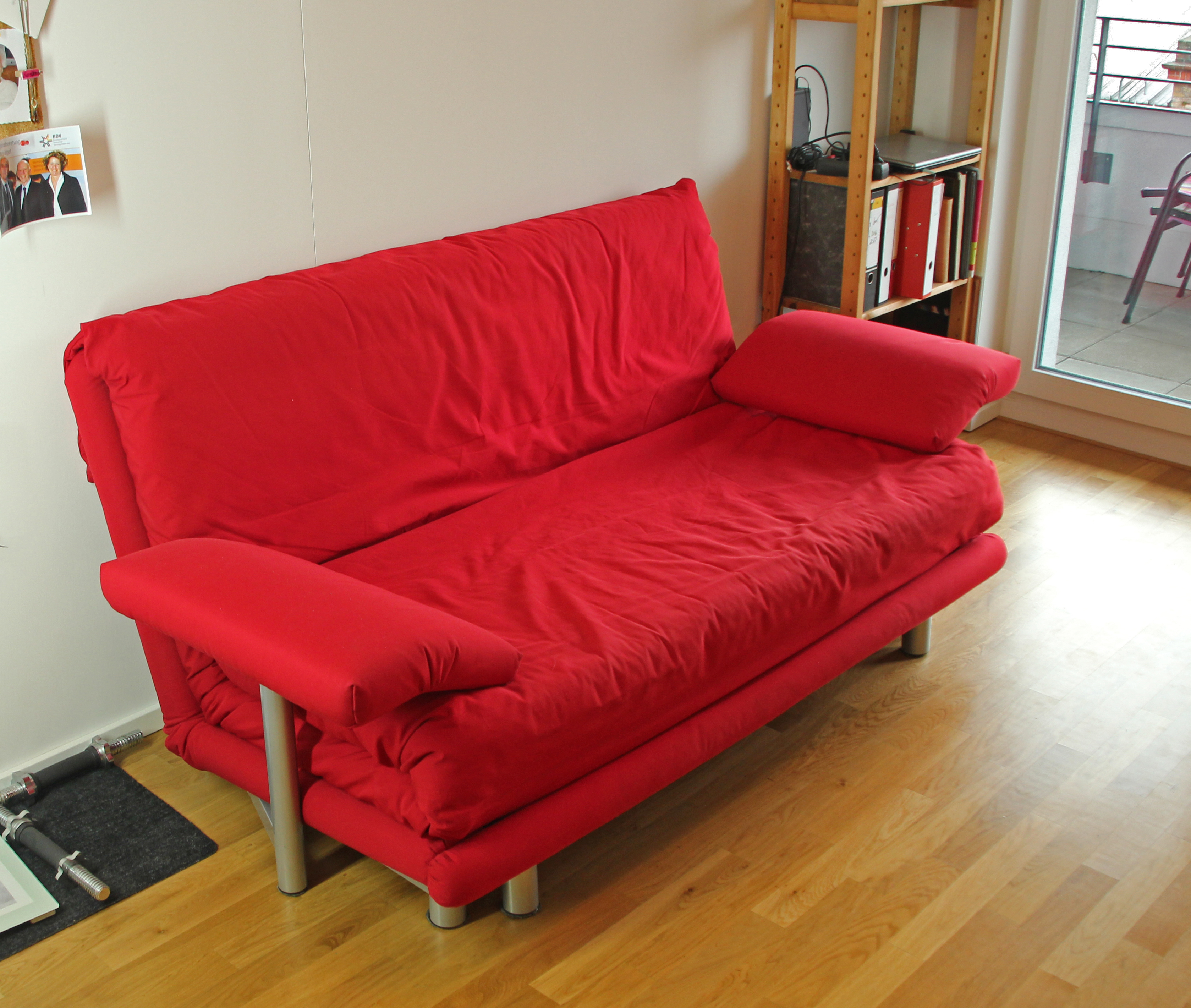 Bildinhalt: Rotes Klapp-Sofa der Firma Ligne Roset Aufnahmeort: Frankfurt am Main, Deutschland